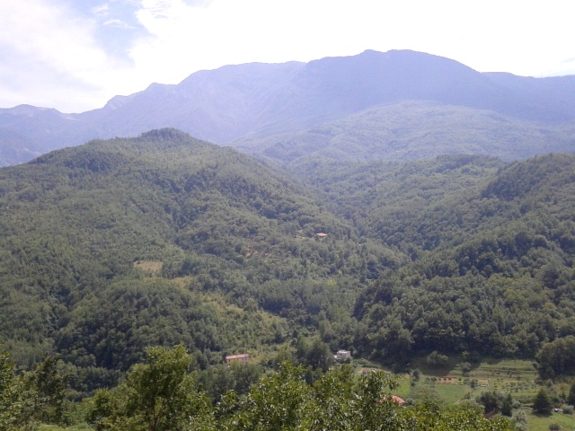 Panoramica della Valle Roveto